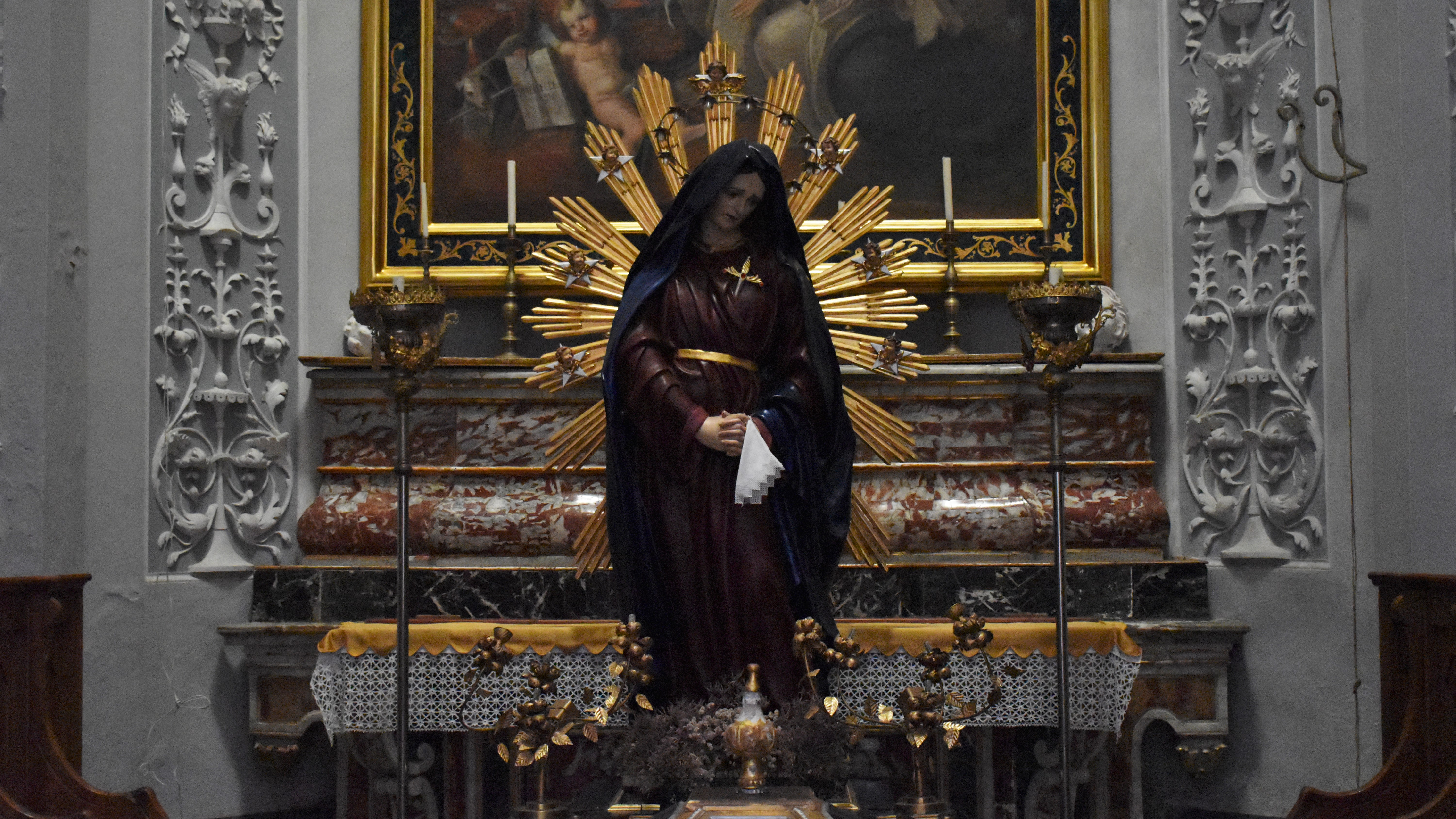 Statua della Madonna Addolorata del Duomo di Ragusa Ibla